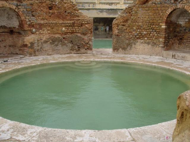 Bain romain de Khenchela, Hammam Essalihine